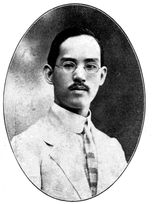 中華民國國會議員